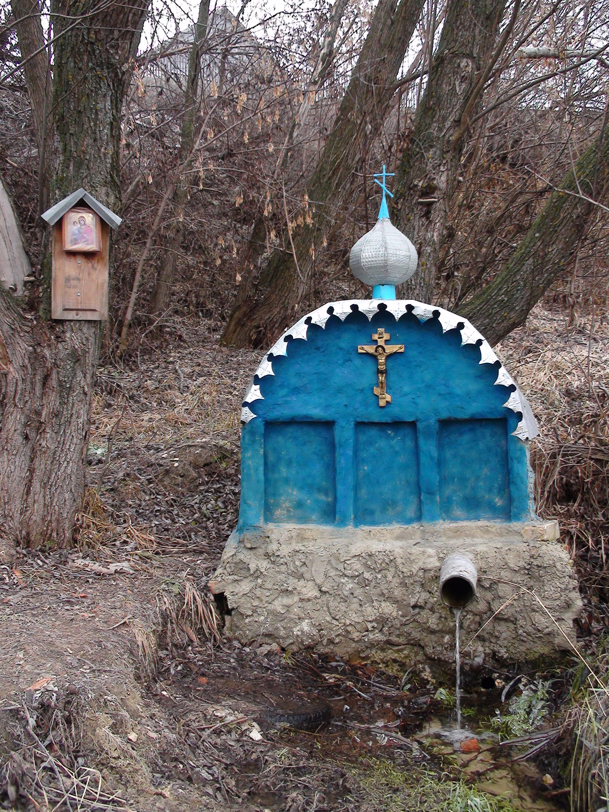 родник "Пращёнин Колодец", г.Скопин